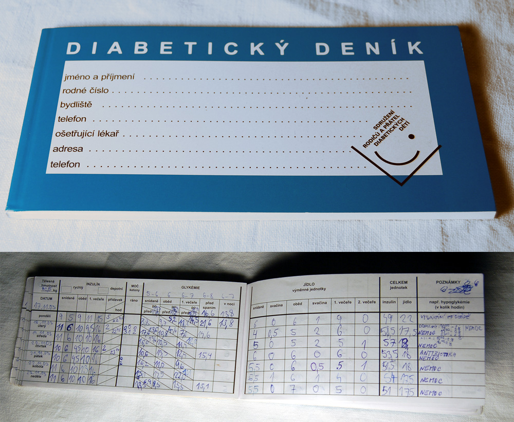 Diabetický deník od Sdružení rodičů a přátek diabetických dětí